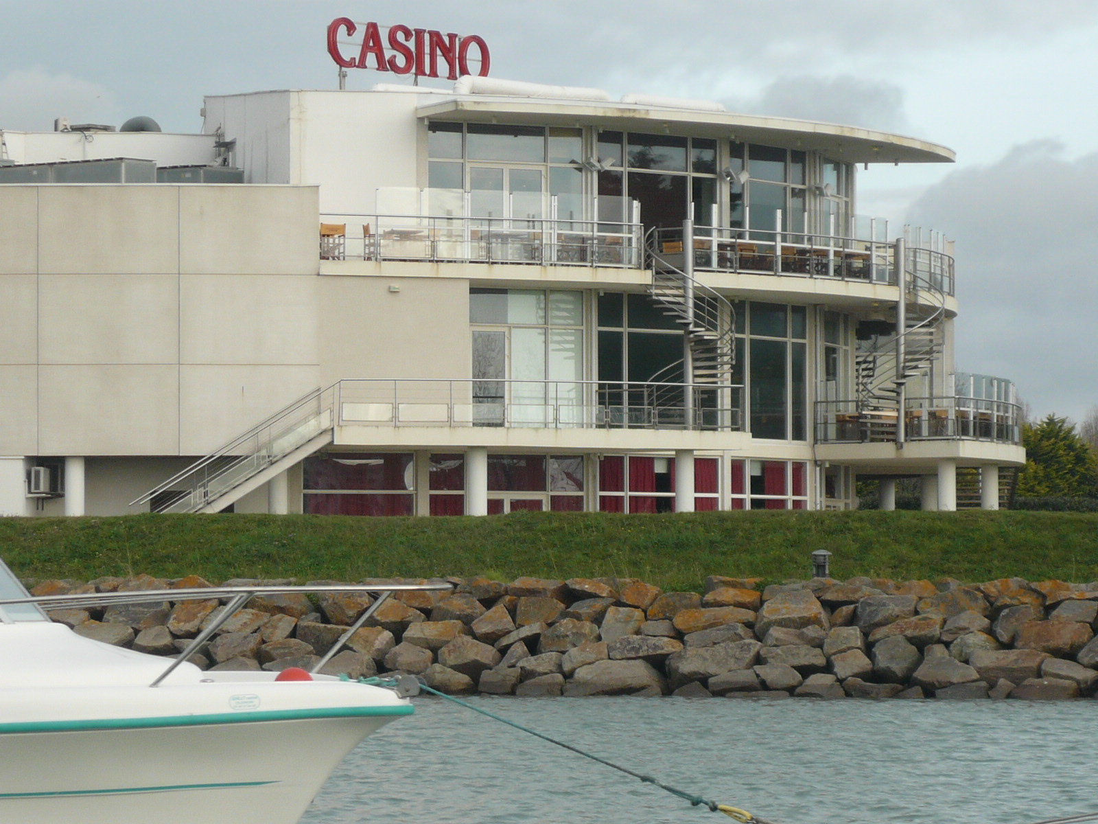 Saint-Gilles-Croix-de-Vie dans le département de la Vendée (France) : Le casino en octobre 2008.